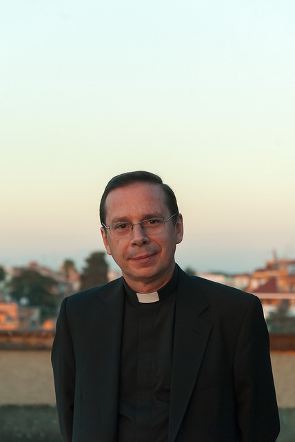 Mariano Fazio Fernández, vicario general del Opus Dei